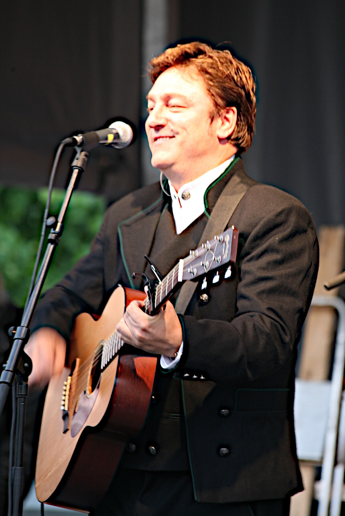 Tor Endresen in consert 23.june.2007 in Laksevåg, Bergen